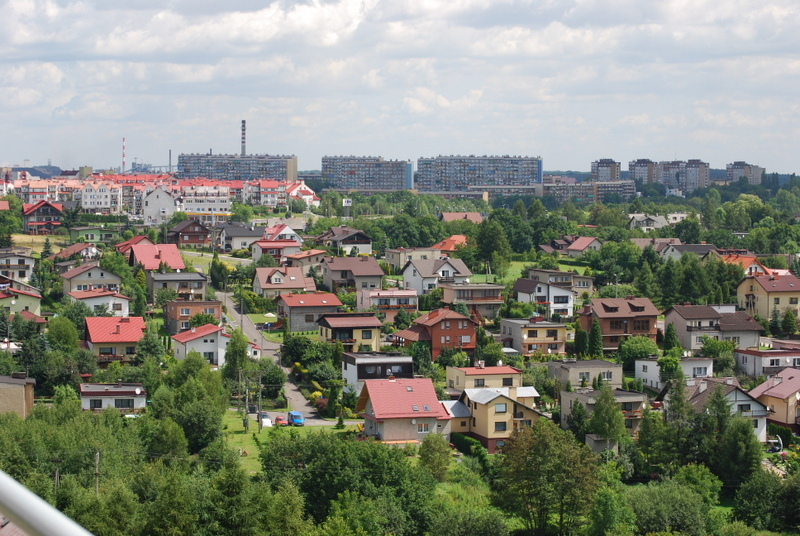 Panorama Wodzisławia - widok na Osiedla Wodzisławskie.